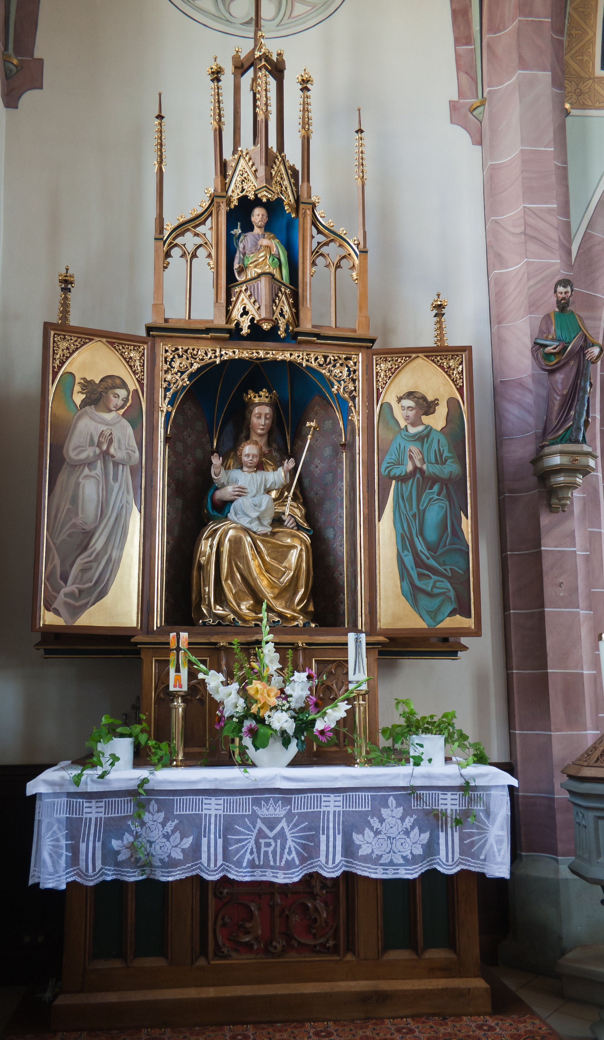 Pfarrkirche St. Nikolaus, Baltringen, Kreis Biberach, Baden-Württemberg, Germany